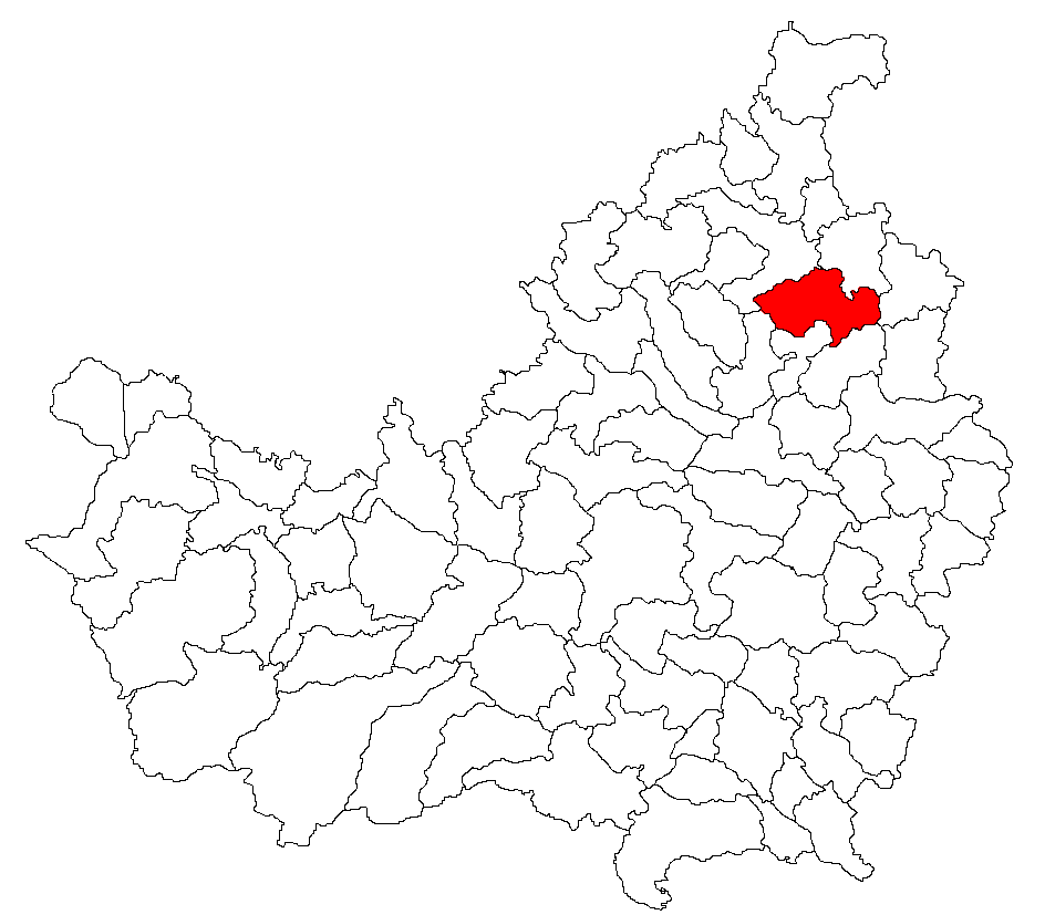 Categorie:Hărţi ale judeţului Cluj